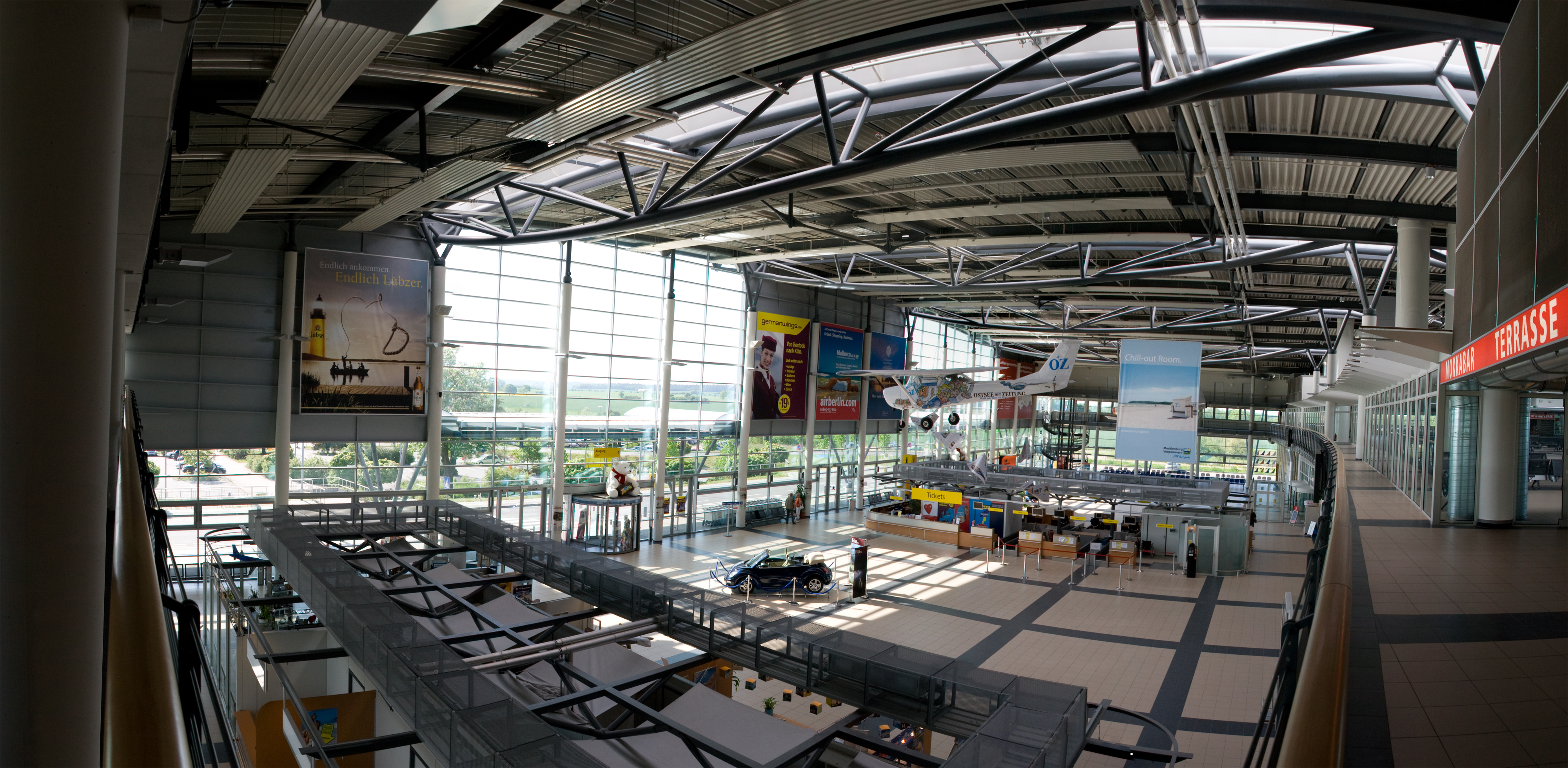 Panorama der Abflughalle des Flughafens Rostock Laage